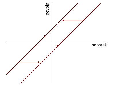 Illustratie van een bepaald type niet-lineariteit